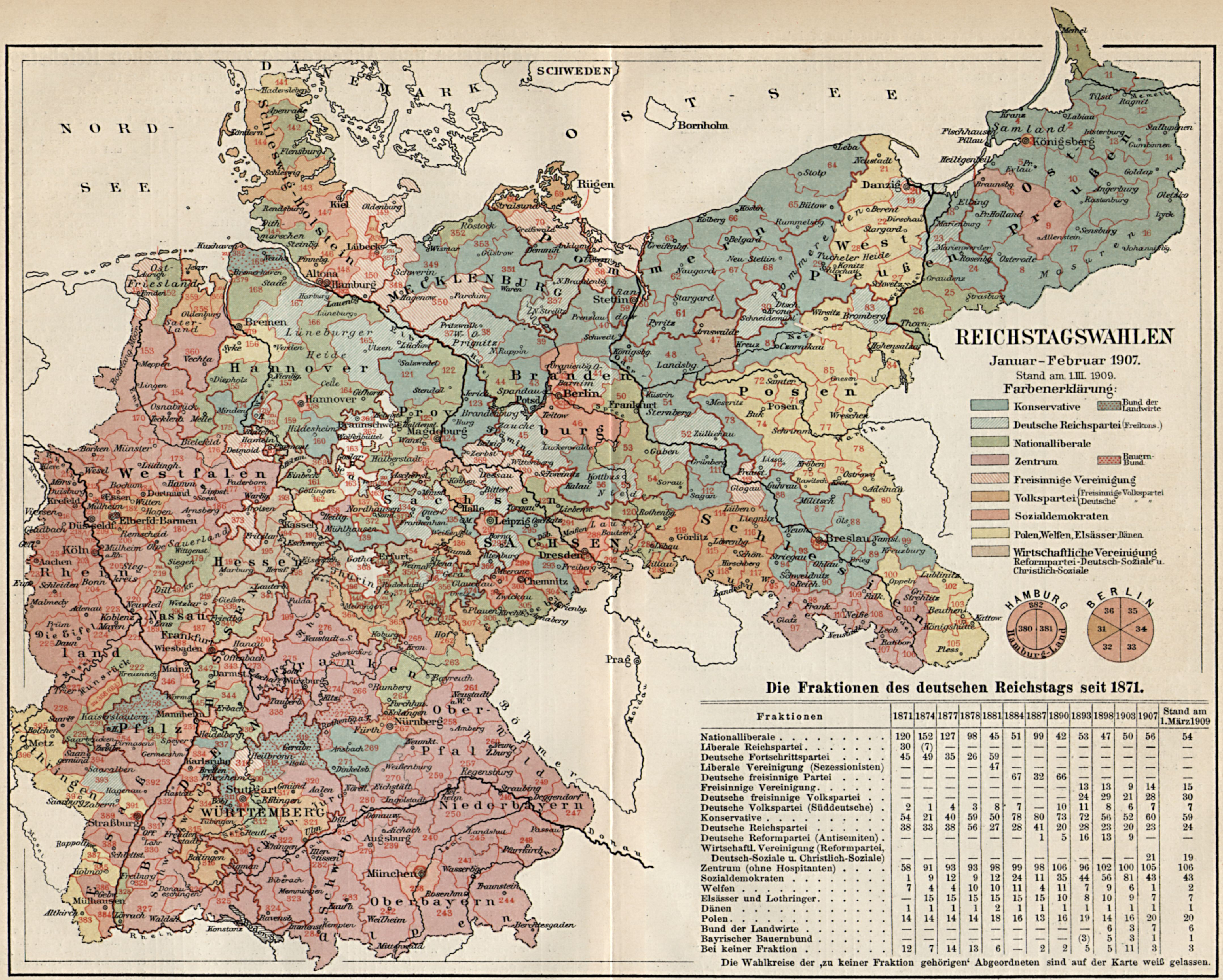 Reichstagswahlkreise Stand 1909